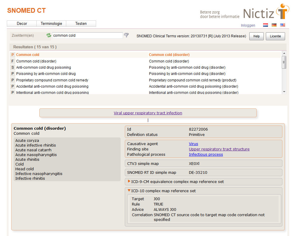 Nederlandse SNOMED CT Explorer